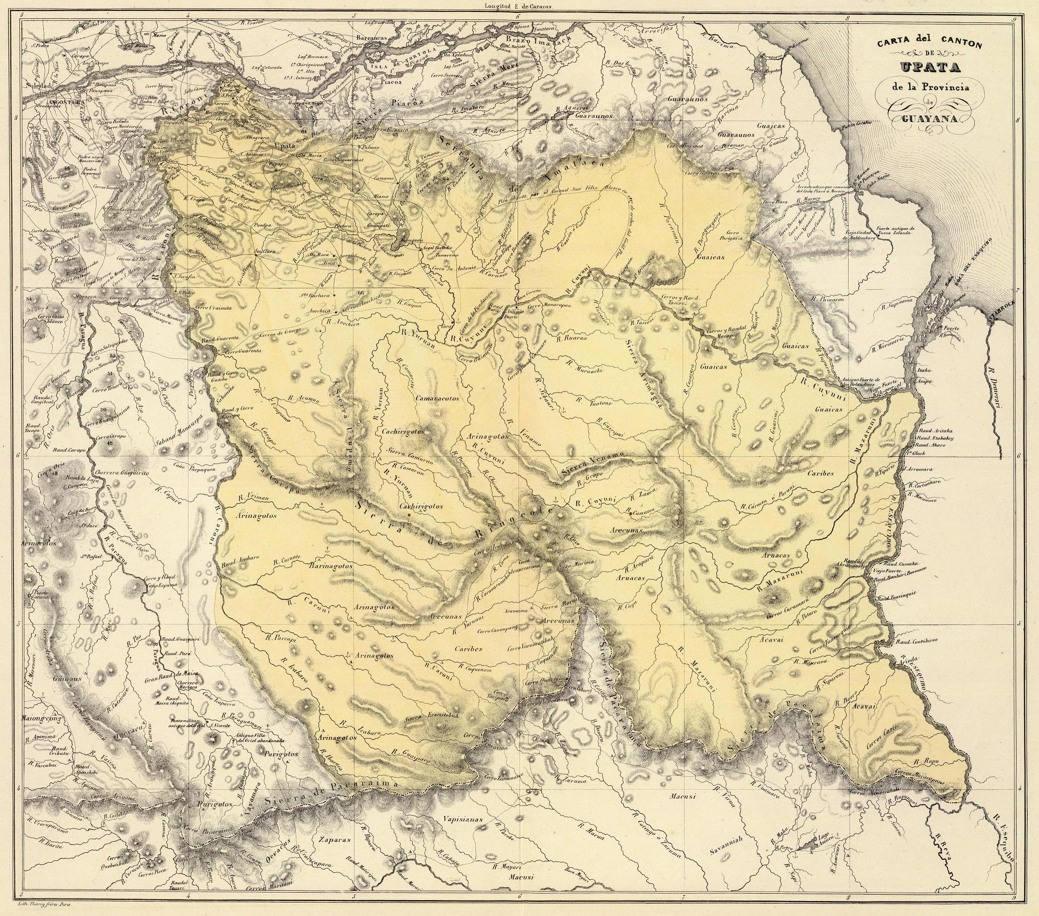 Cantón Upata de la Provincia de Guayana. Tomado del "Atlas físico y político de la República de Venezuela", 1840.